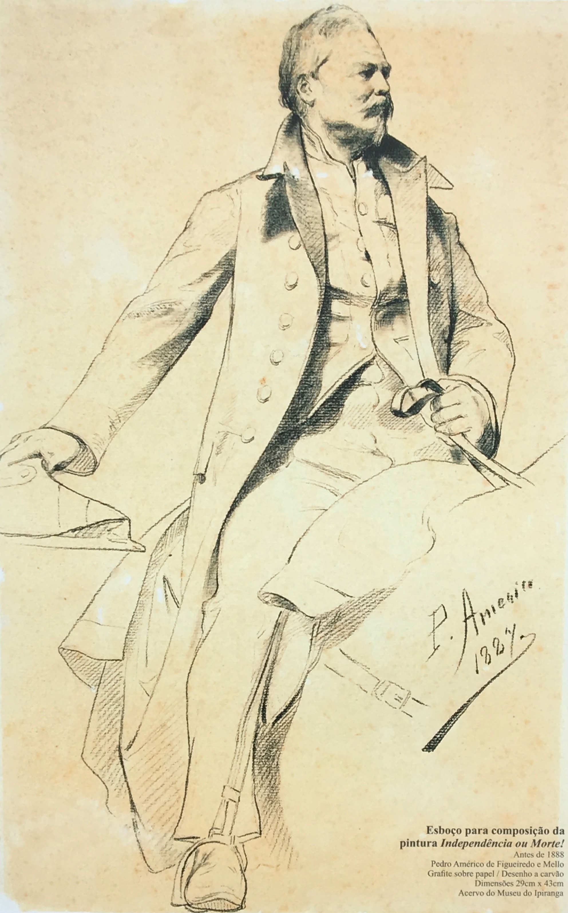 z